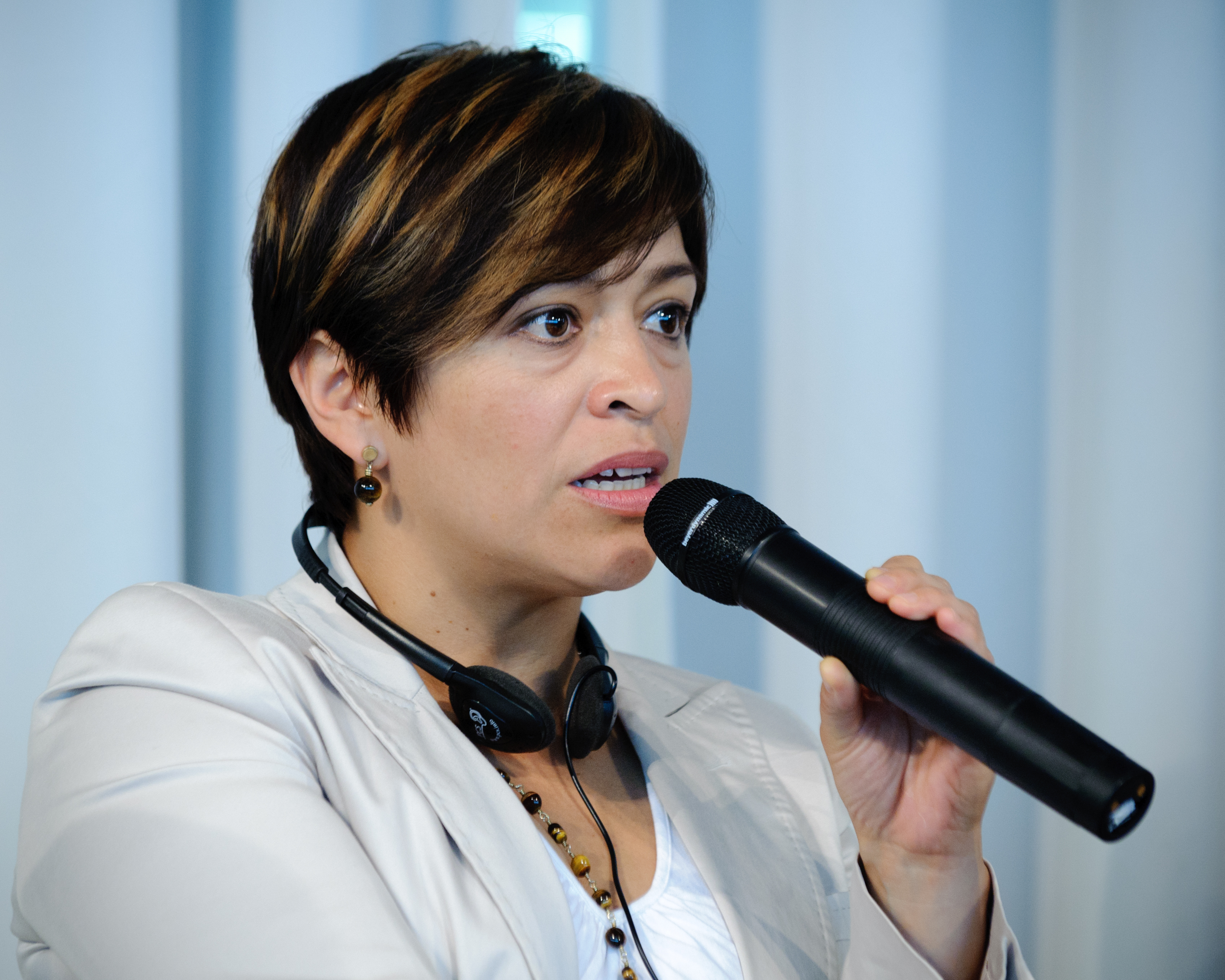 Anabel Herandez (Journalistin, Autorin, Mexiko Stadt, Mexiko) Foto: Stephan Röhl